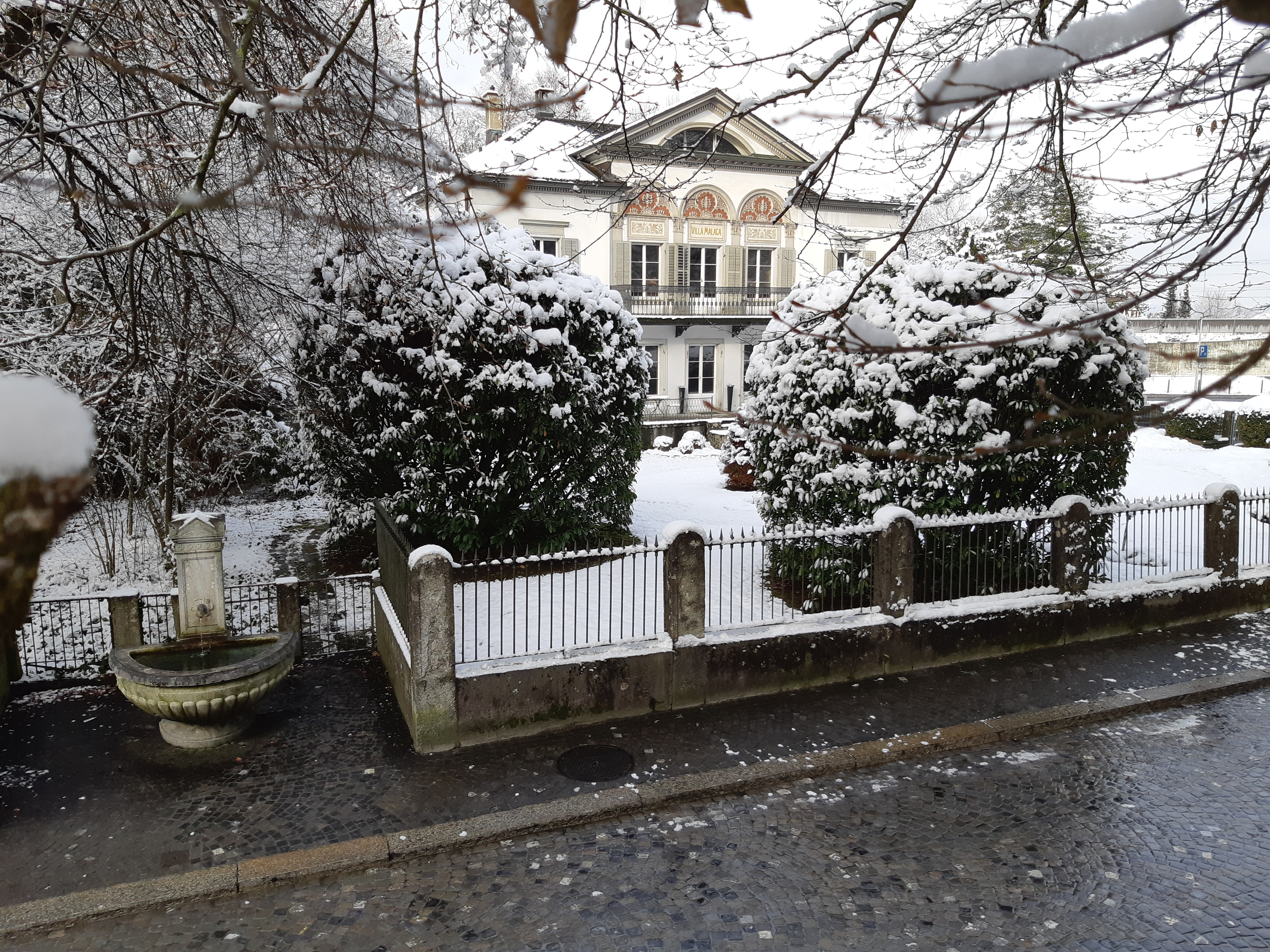 Villa Malaga an der Schützenmattstrasse 7, in Lenzburg (Switzerland)